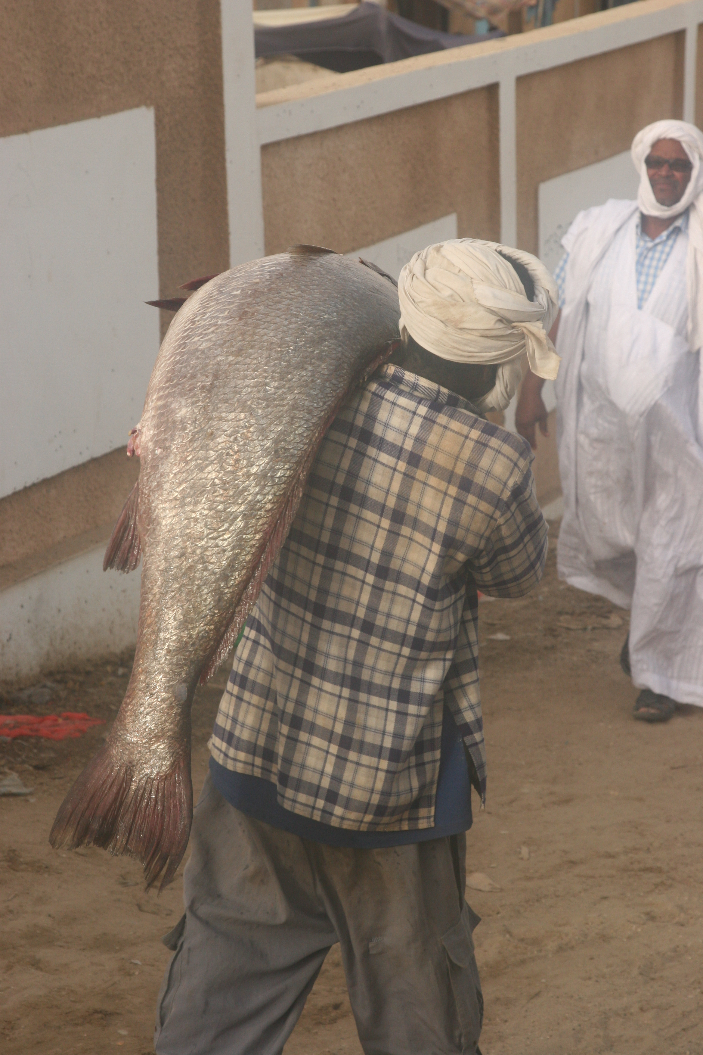 Pêcheur transportant un Courbine (Argyrosomus regius) en Mauritanie